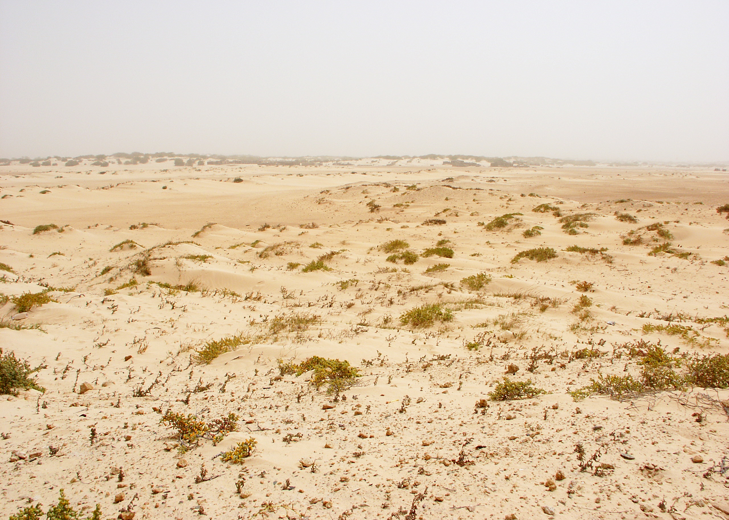 Boa Vista, Cape Verde, under Harmattan.